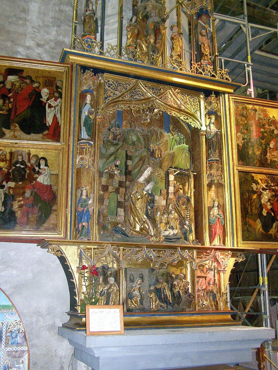 Bazilika sv. Egídia, oltár Narodenia Pána